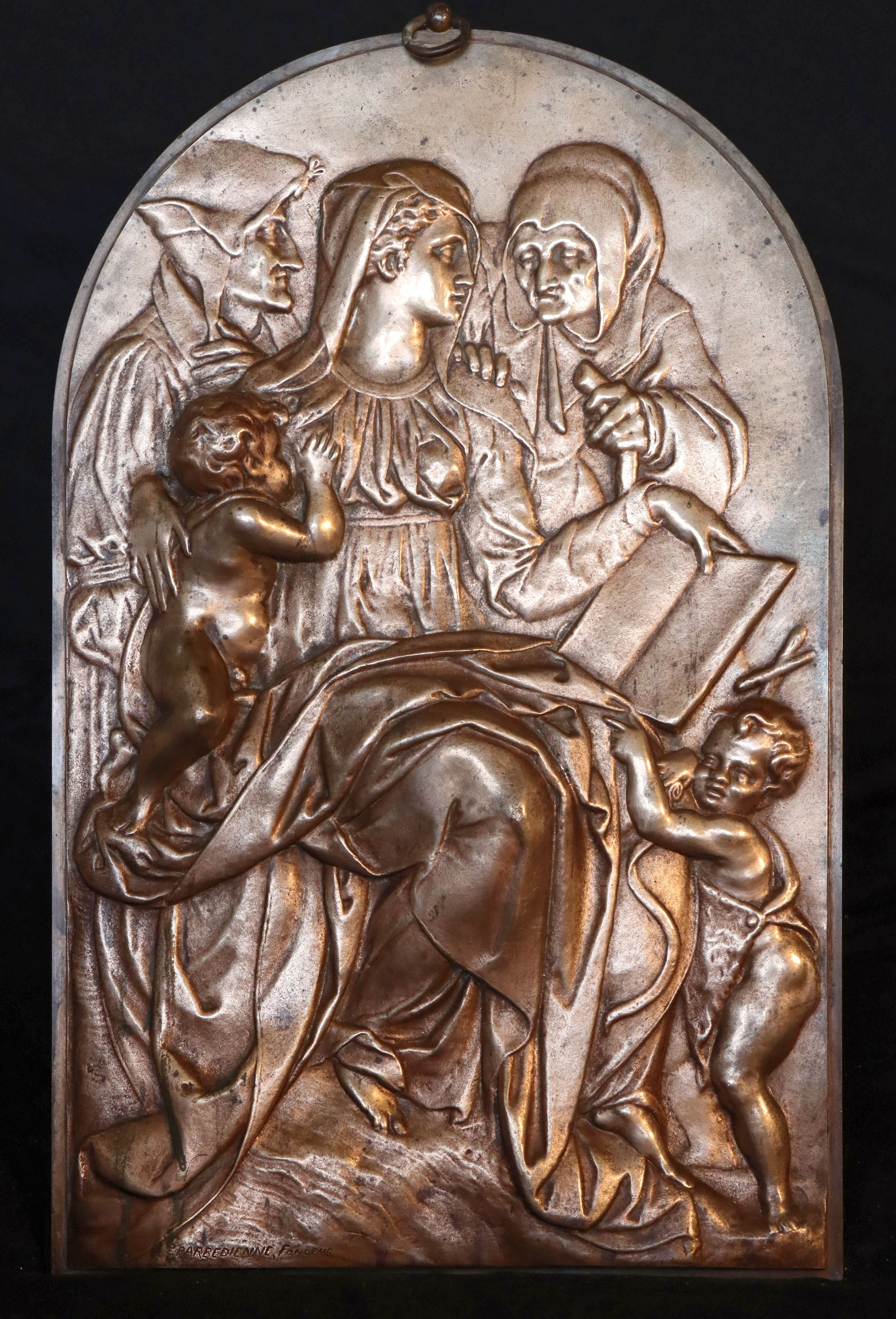 Plaque en bronze du fondeur Ferdinand Barbedienne, d'après un bas relief en marbre de Pierino da Vinci. 43 cm. Modèle créé en 1845.